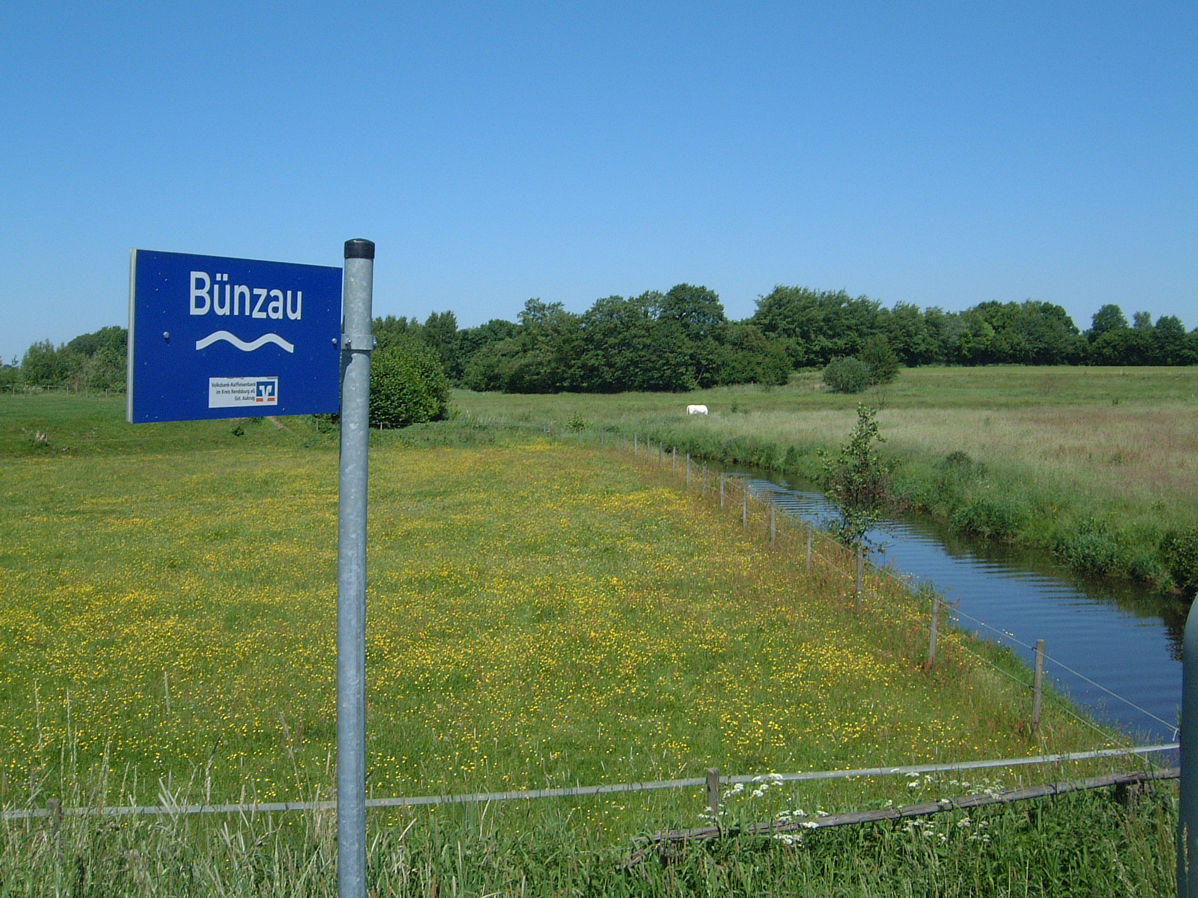 Bünzau an der Brücke in Aukrug-Innien